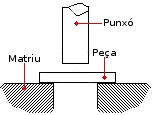 Esquema punxonat